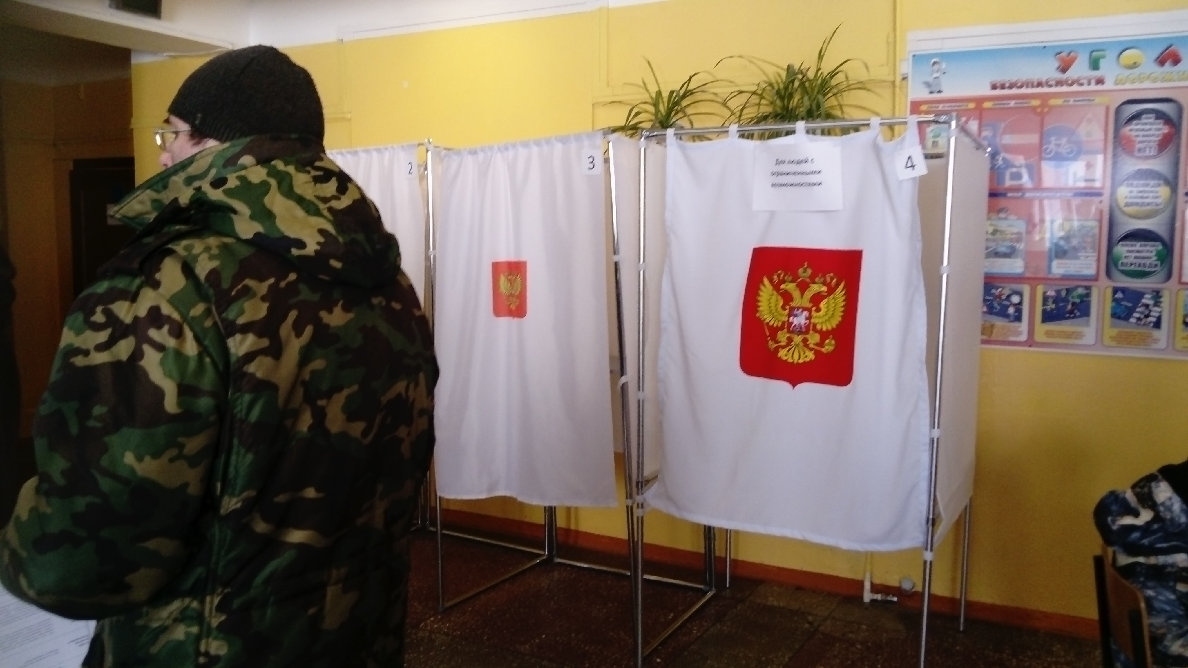 Кабинка выборы президента России. Петропавловск-Камчатский, участок 41 (территория школы 40)